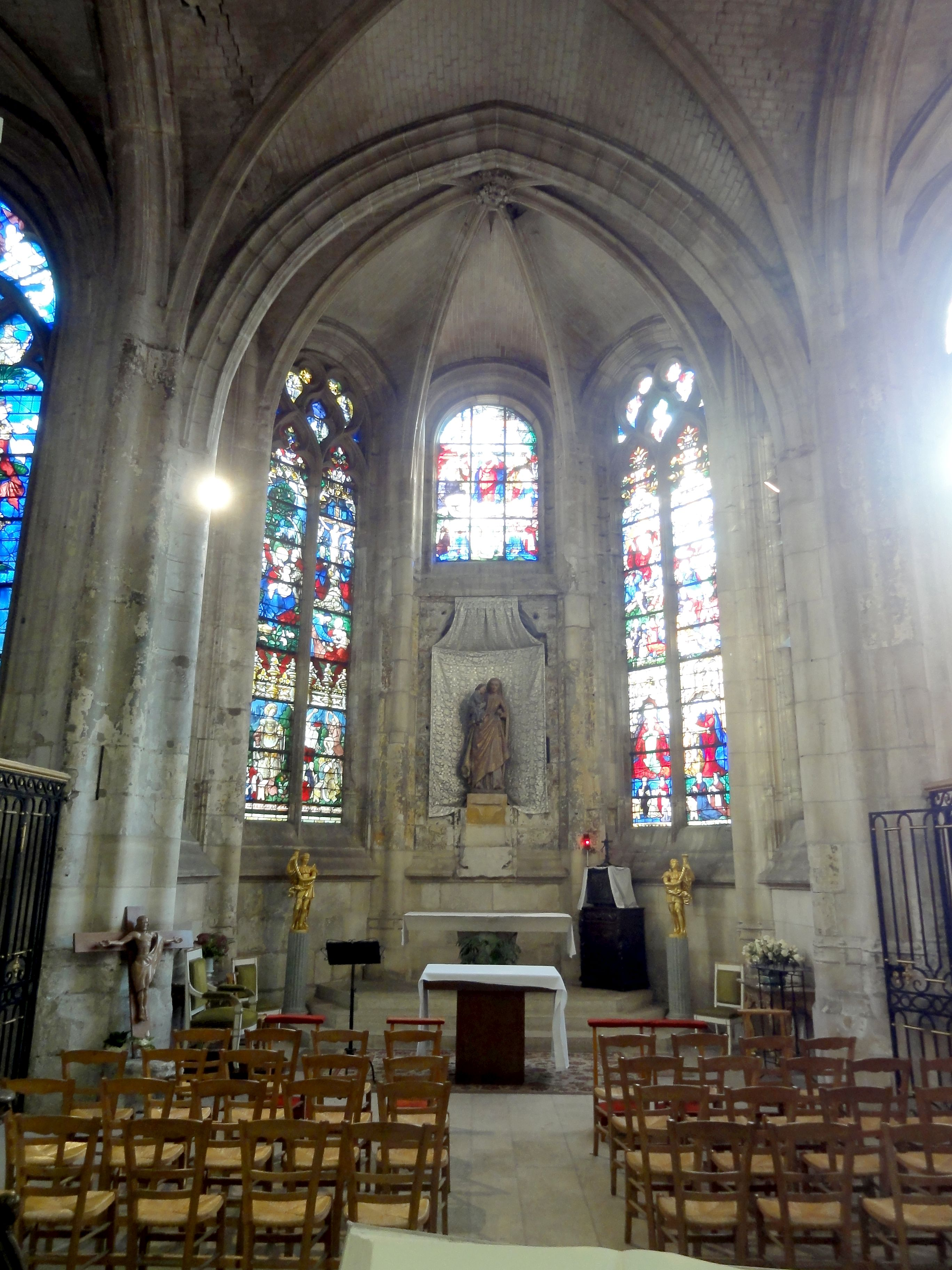 Chapelle d'axe (chap. du Saint-Sacrement).